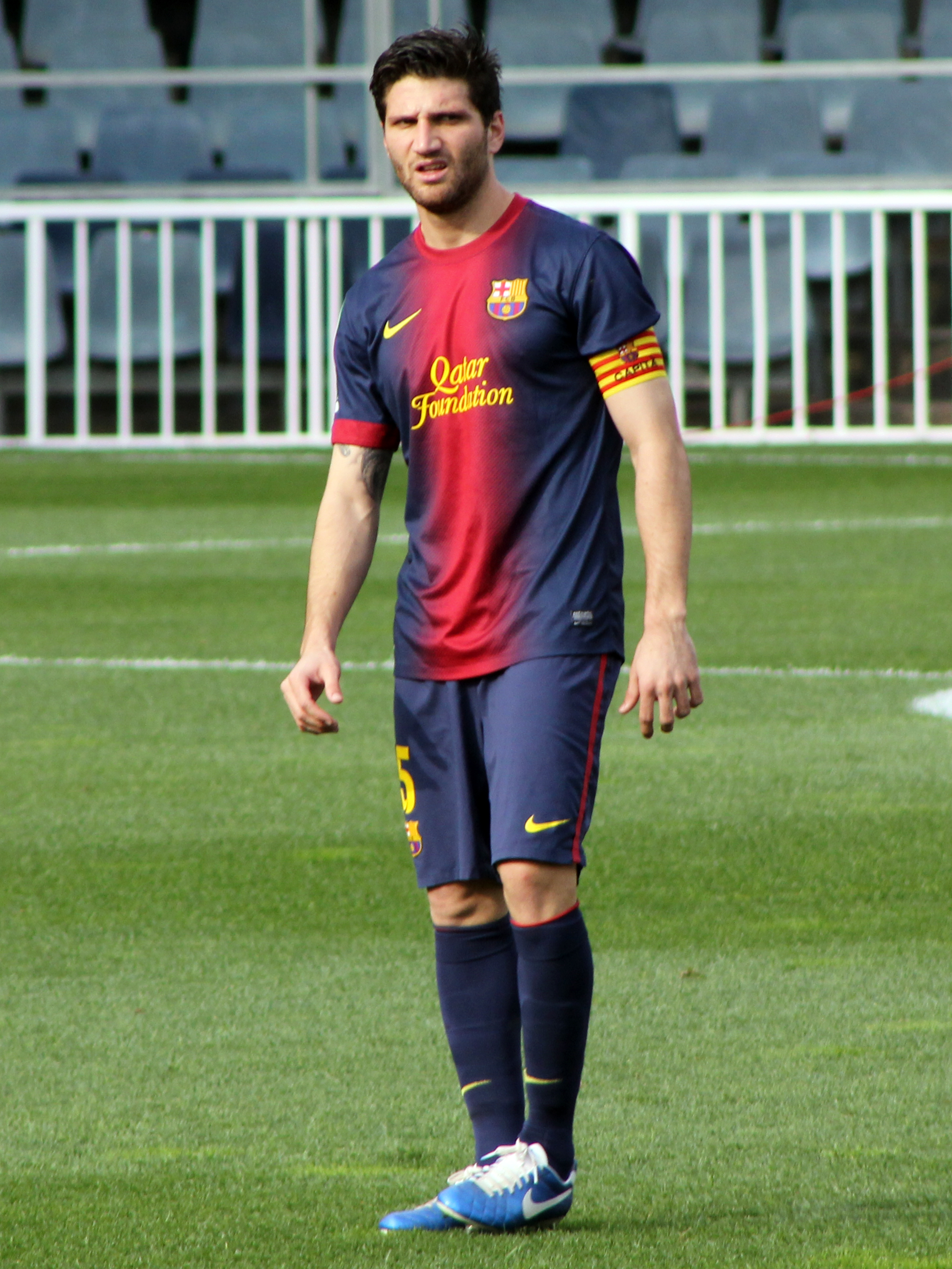 Jugador del FCB B en la temporada 2012-2013